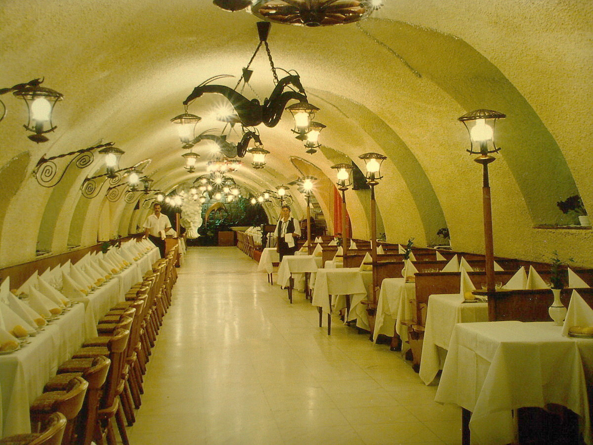 Crama Cerbul Carpatin, Braşov, România